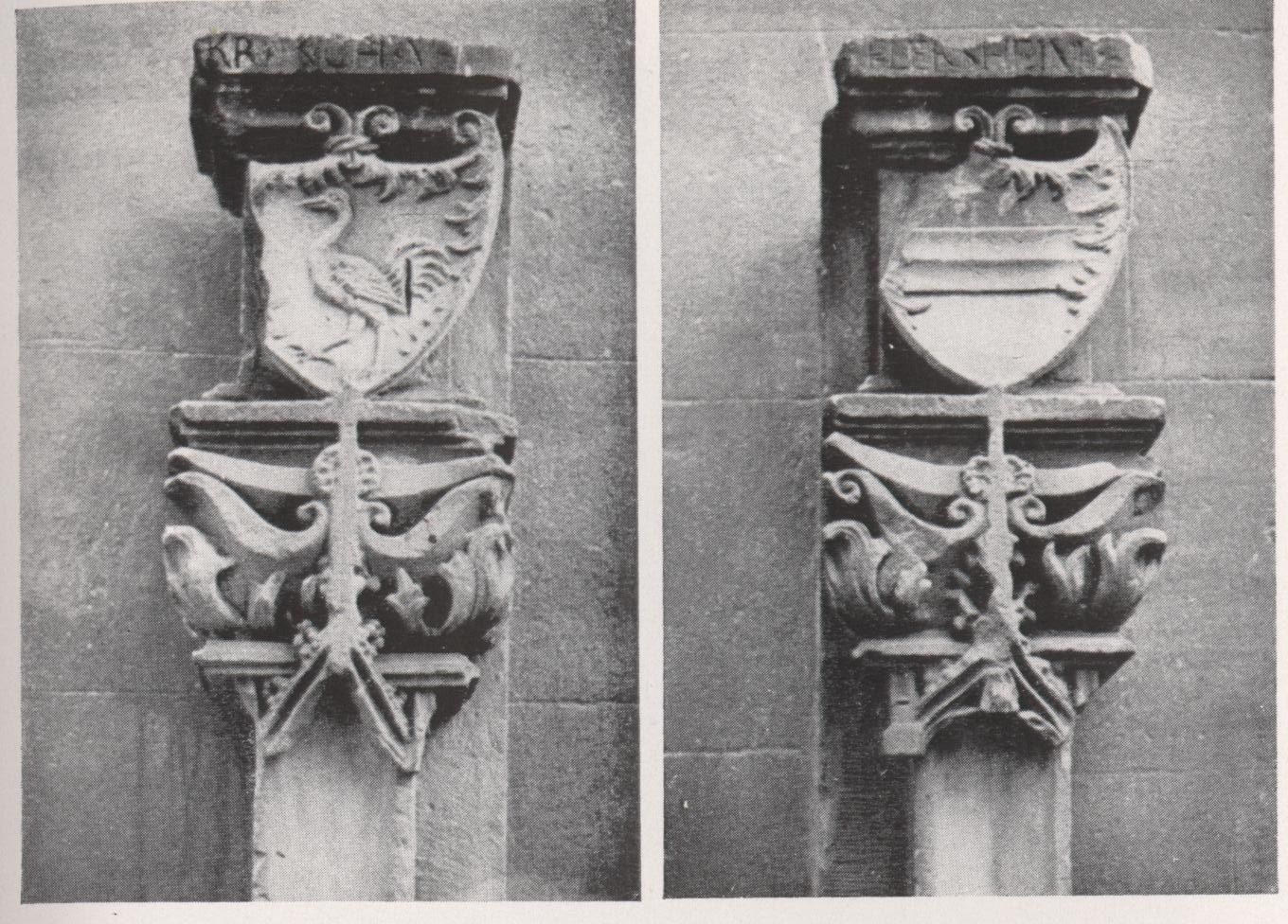 Philipp von Flersheim, Bischof von Speyer, Wappenpilaster von seinem Grab